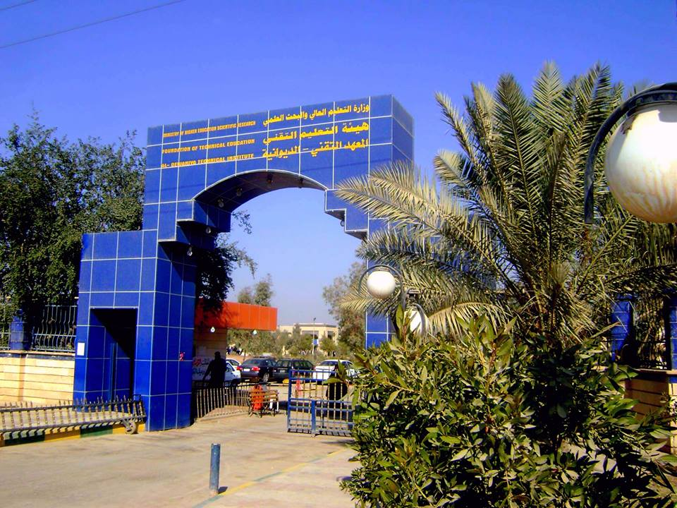 بوابة المعهد التقني / الديوانية لدخول الطلبة والاساتذة